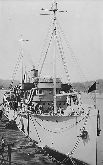 USS Fulton (AS-1)